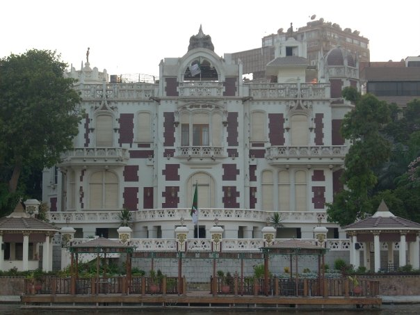 Français cadien: l'ambassade de l’Algérie en Egypte sur le bord du Nil a elkahira Egypte